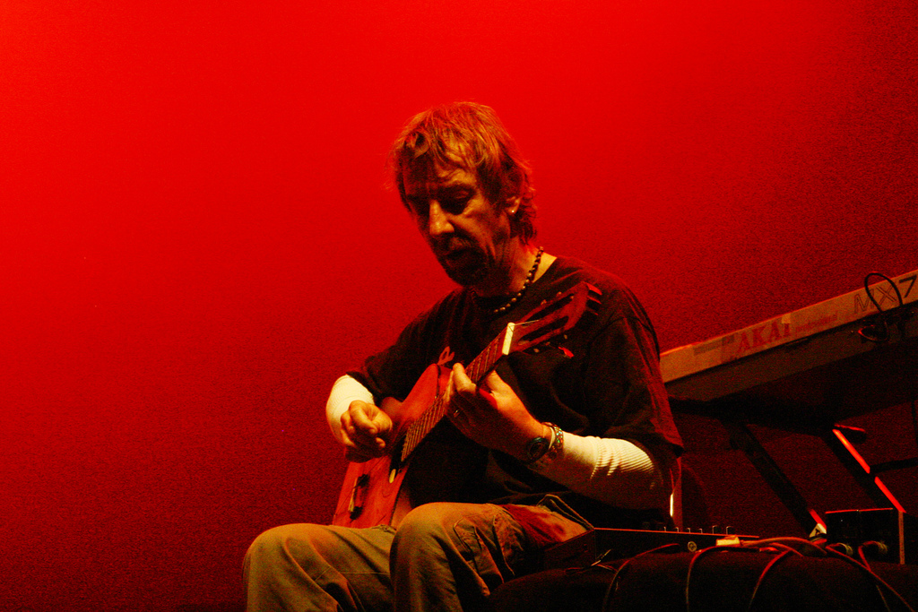 Al Comet, tecladista da banda Young Gods